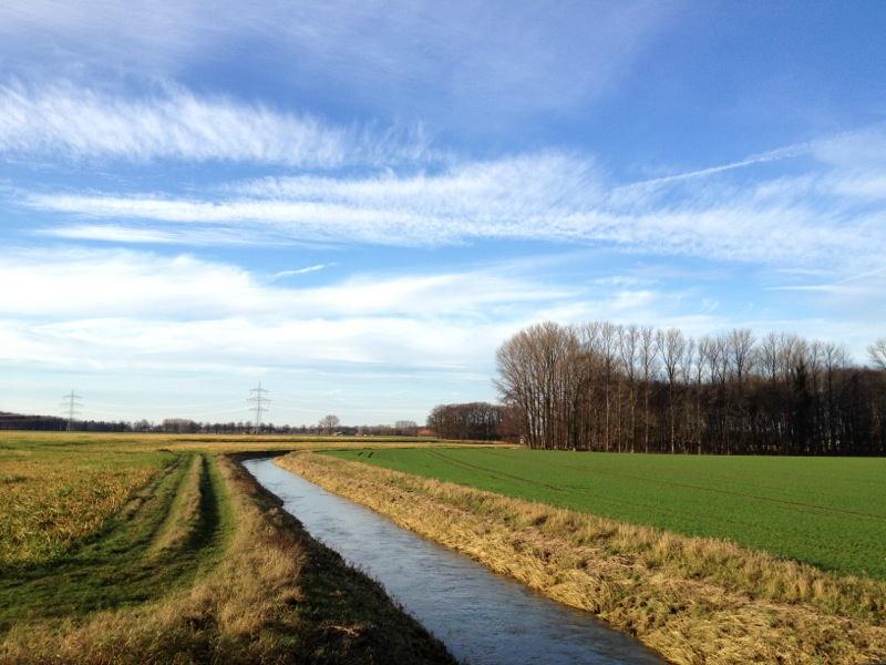 Axtbach in Herzebrock-Clarholz (Sicht von der Brücke am Heitmannsweg)